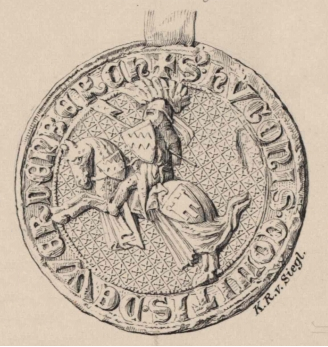 Reitersiegel des Hugo Graf Werdenberg von 1320 Federzeichnung in Schwarz von Karl Ritter von Siegl, signiert. Vorzeichnung zum "Kronprinzenwerk" (Die österreichisch-ungarische Monarchie in Wort und Bild, Wien 1886-1902), Bd. "Tirol und Vorarlberg", 1893, S. 213